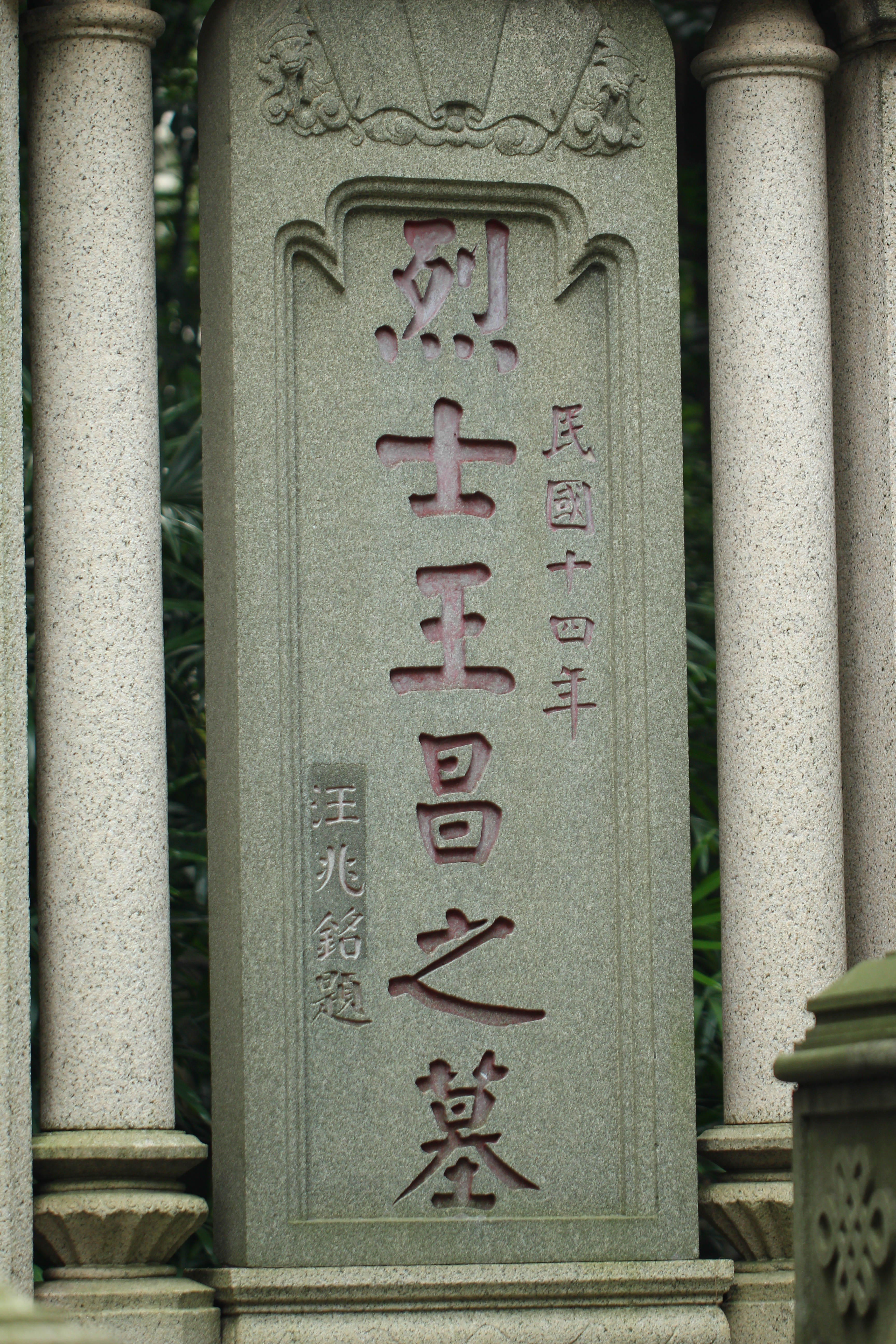 中華民國十四年立於黃花崗，汪兆銘題字。